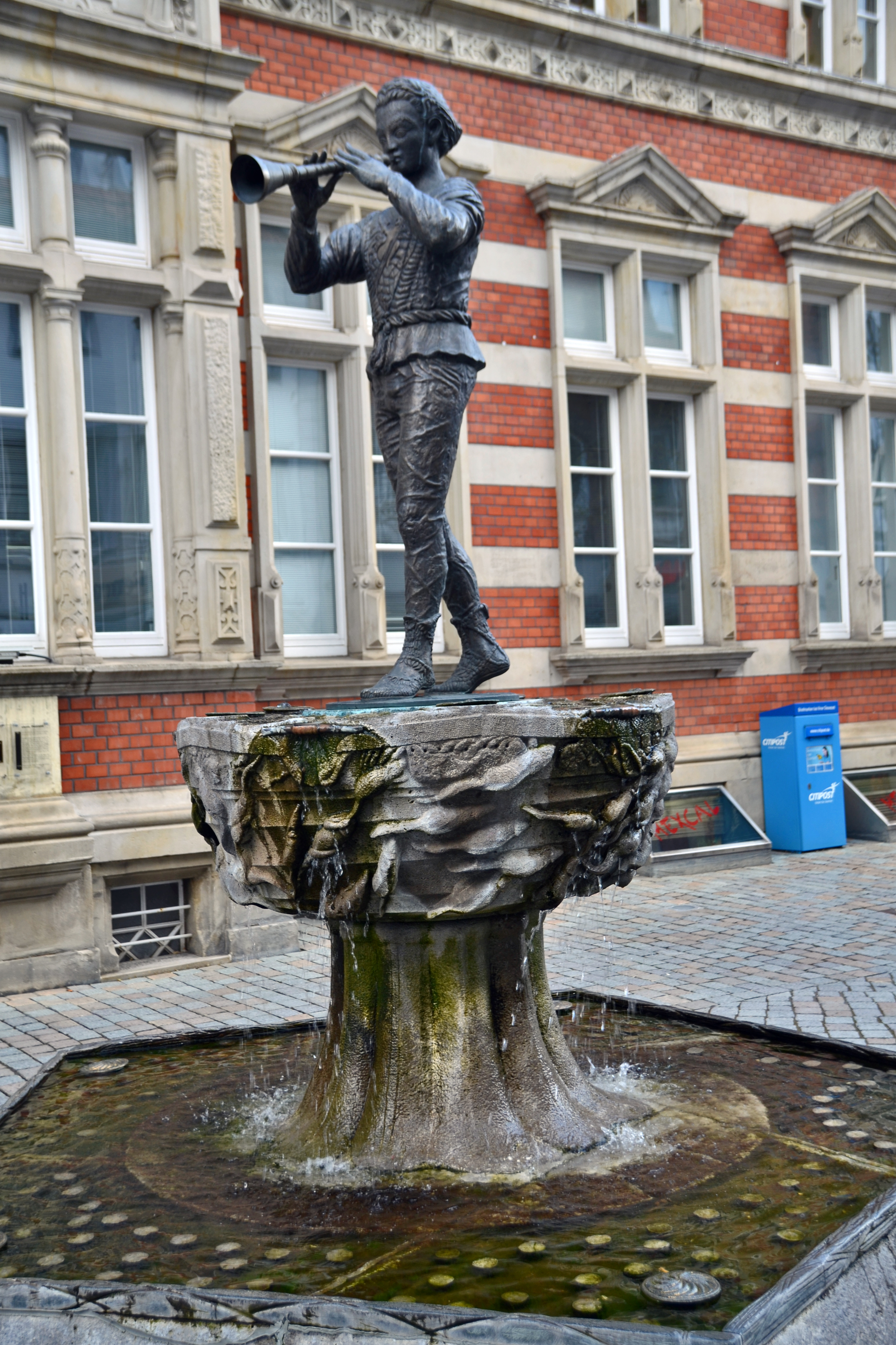 Hameln-Osterstrasse - Rattenfänger Statue